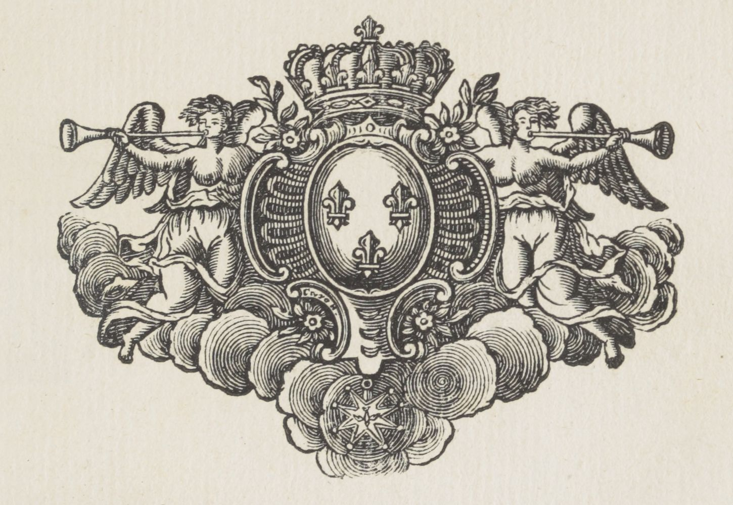 Traduction du discours latin prononcé par le pere J. B. Geoffroy, de la Compagnie de Jesus, sur la convalescence de monseigneur le Dauphin, le mardy vingt-six septembre 1752 by Jean-Baptiste Geoffroy (1706-1782)